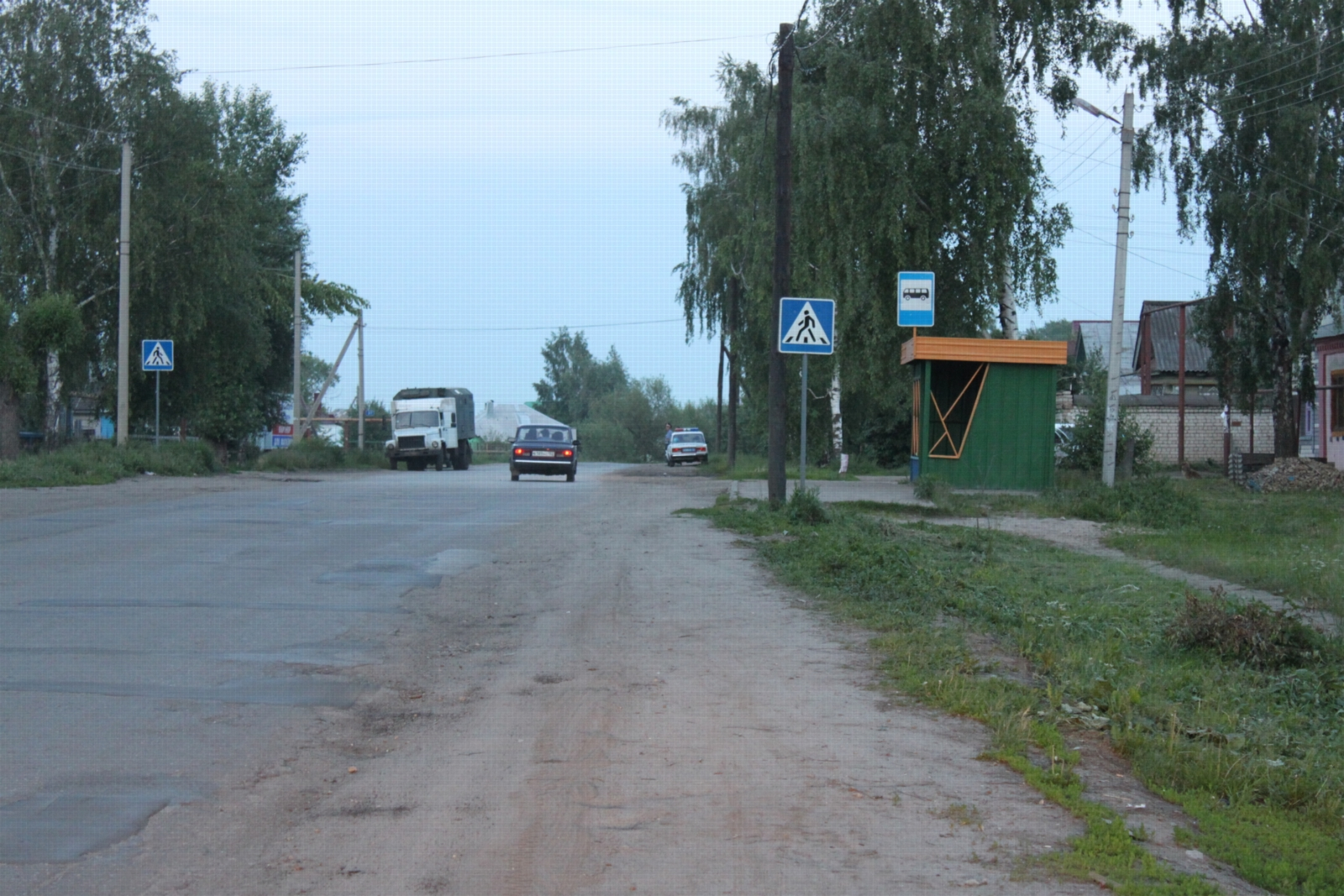 Центральный проезд